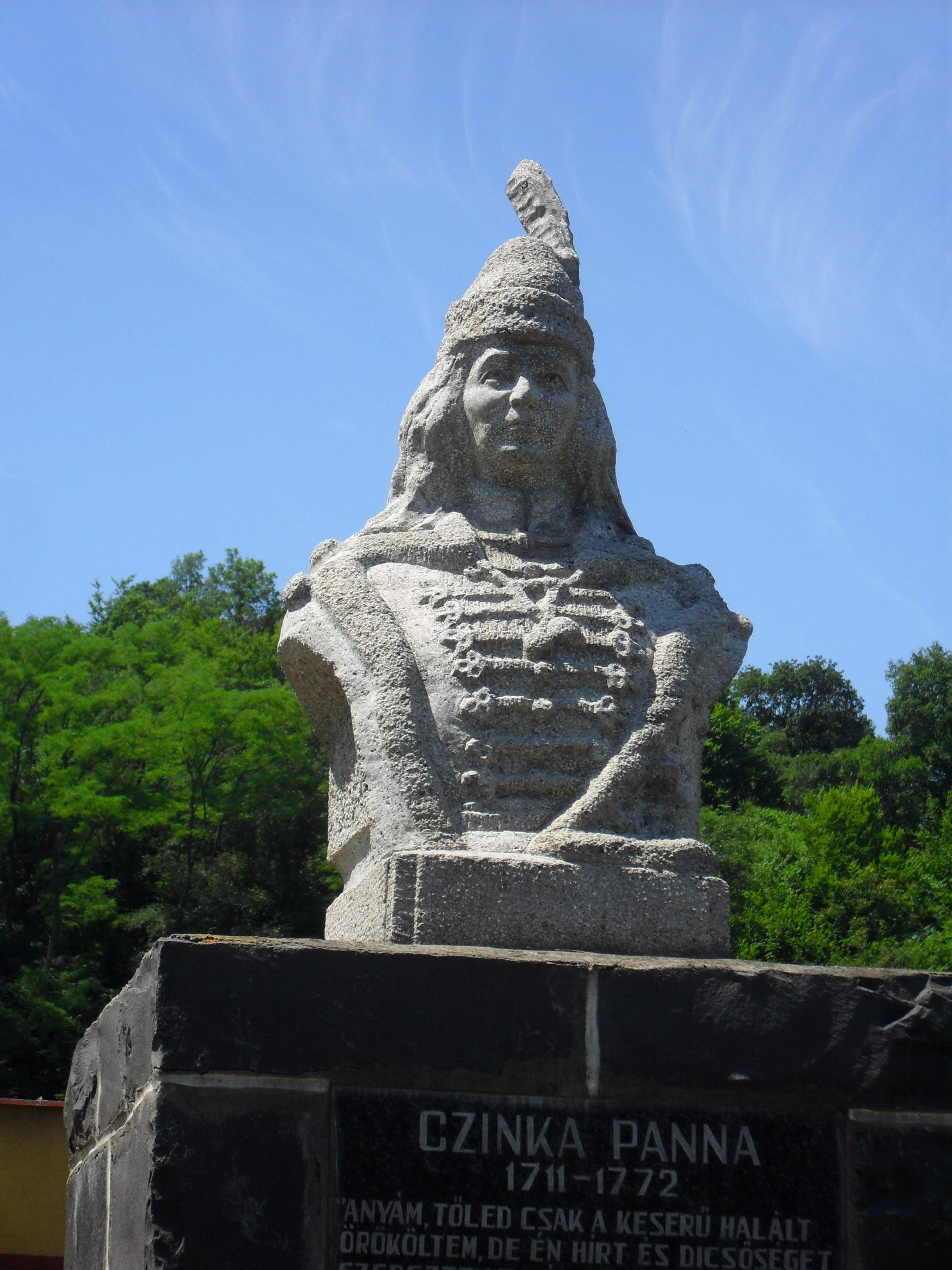 Sajógömör - Czinka Panna mellszobra